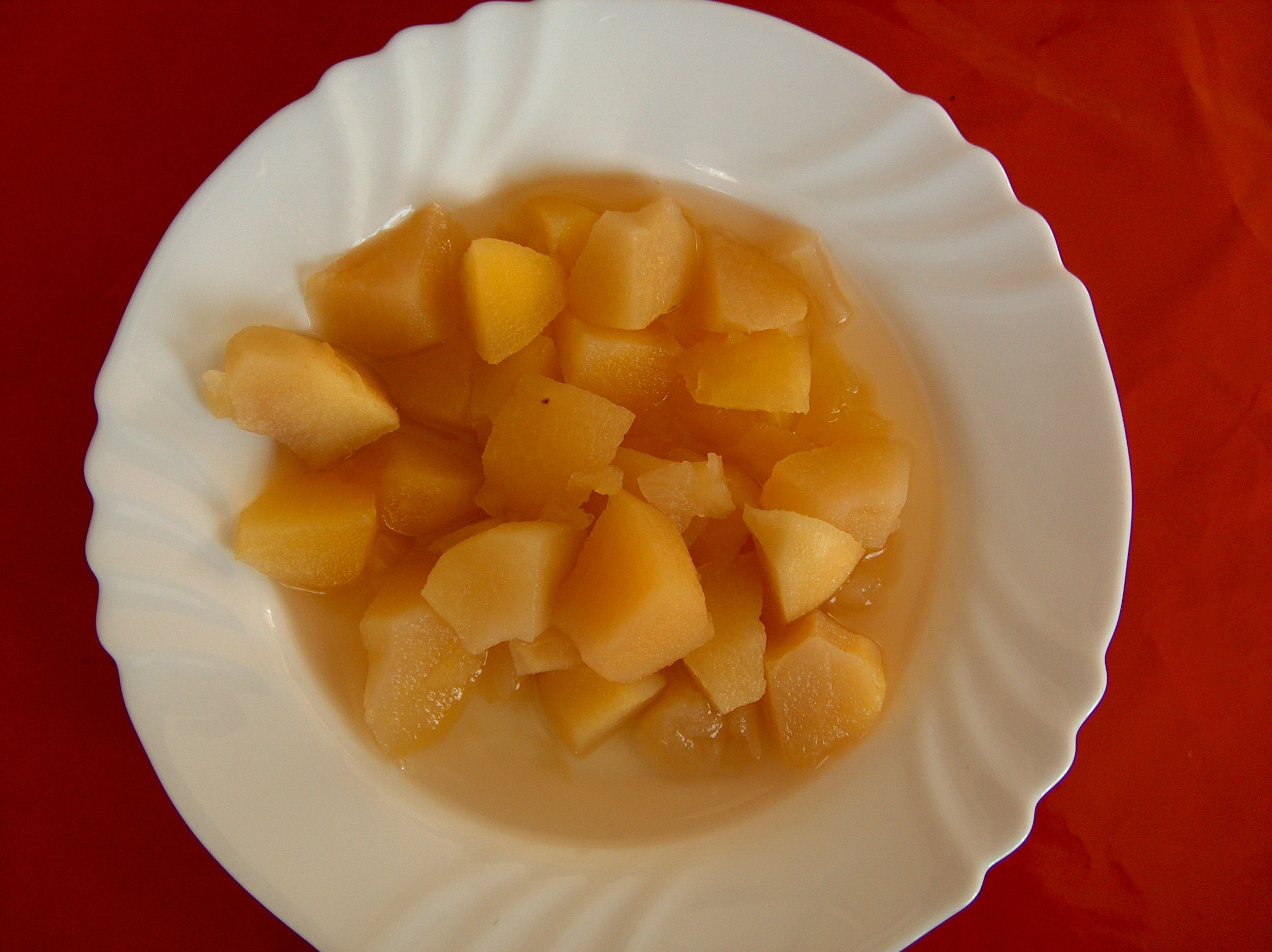 Ein Teller mit Apfelkompott